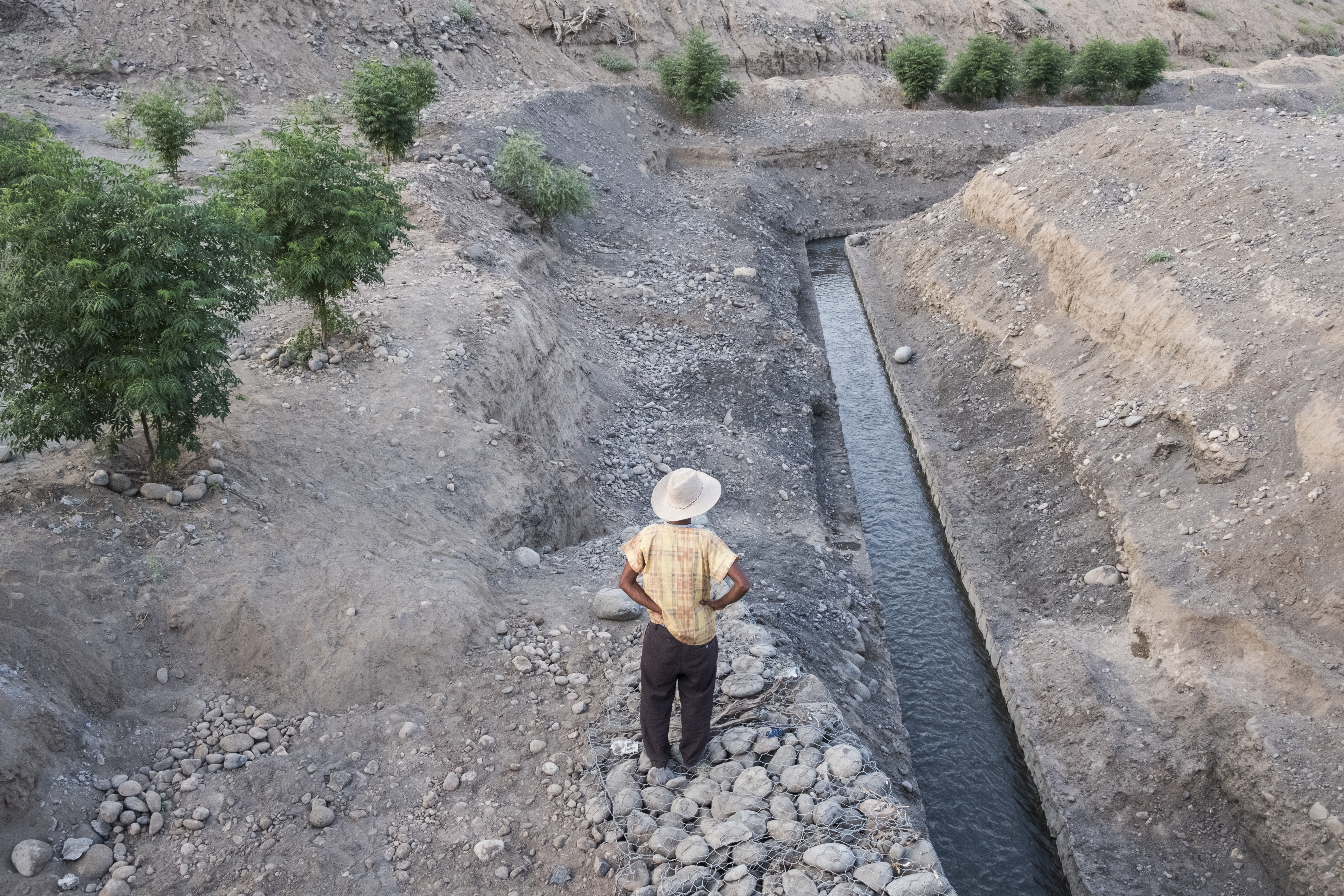 Infrastruktur zur Bewässerungslandwirtschaft in der Savanne von Subuli, Region Afar, Äthiopien. Man sieht den Hauptkanal, der vom Fluss Arso zu den bewässerten Feldern führt - ein Projekt der Stiftung Menschen für Menschen Schweiz.